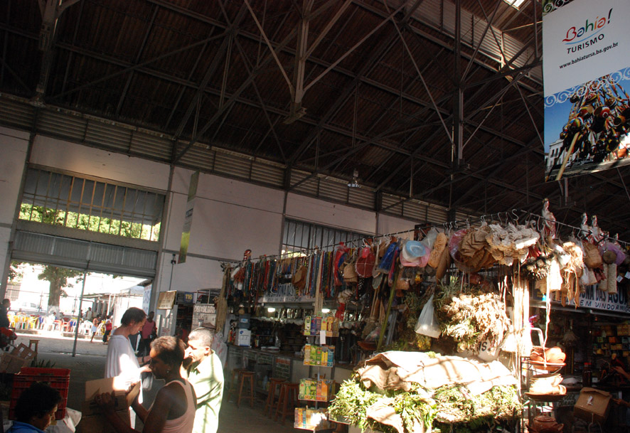 Visita às Obras da Feira de São Joaquim, em 23.04.2012 - Foto: João Ramos - Bahiatursa